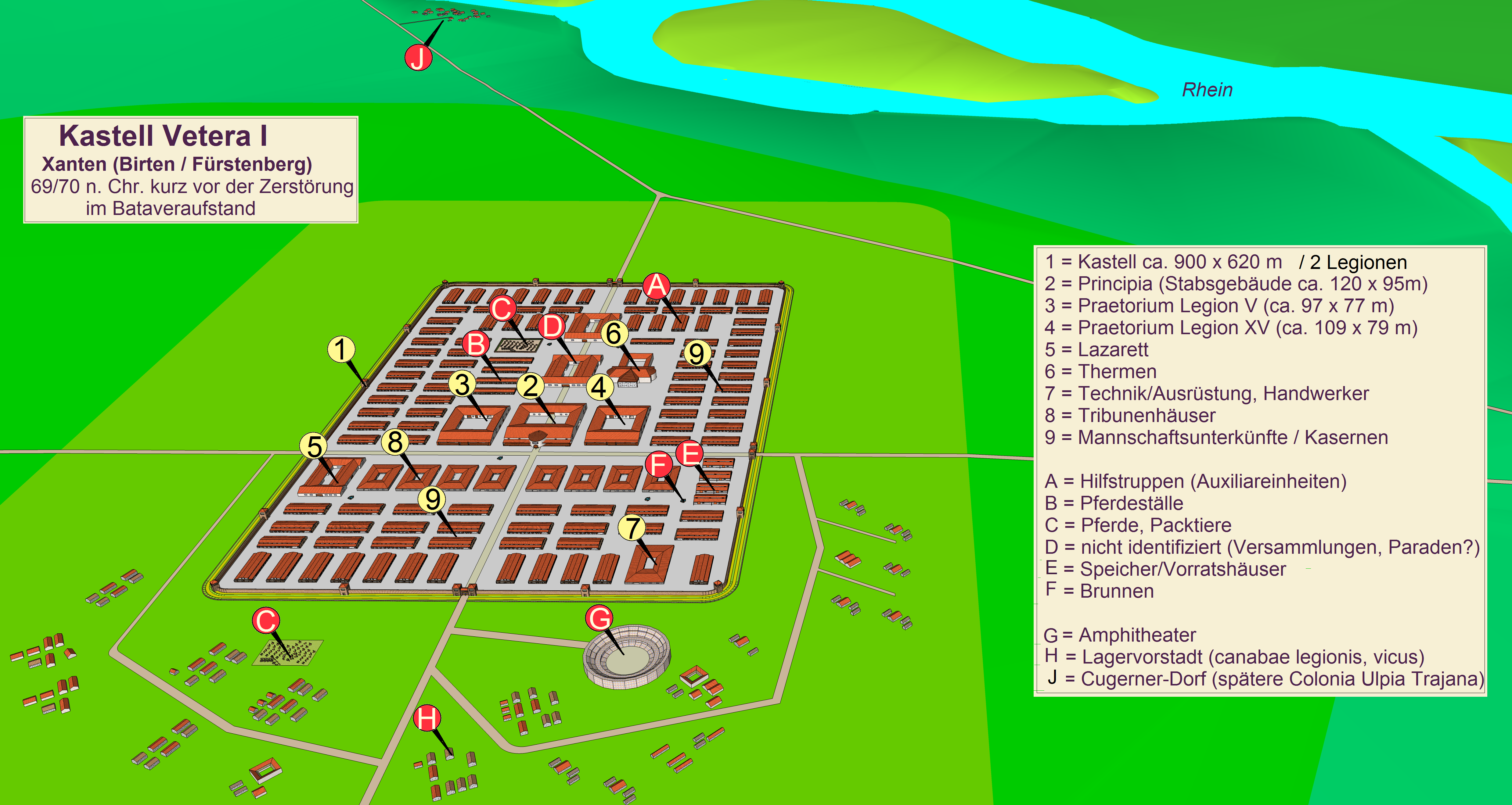 Rekonstruktionsversuch: Kastell Vetera I (Xanten-Birten) ca. 70 n. Chr. kurz vor der Zerstörung im Bataveraufstand - nach Veröffentlichungen des LVR-Museums Xanten